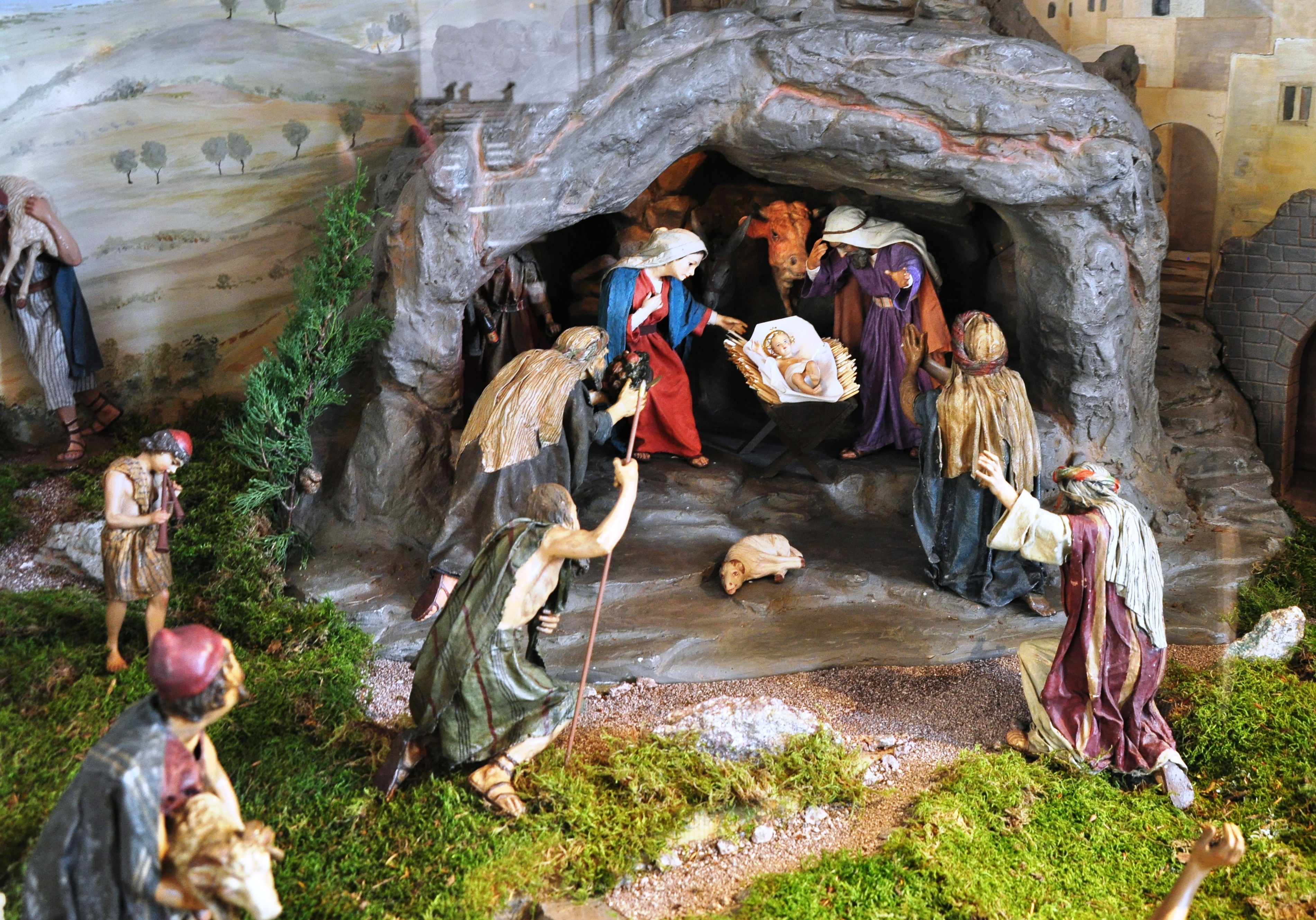 Osterrieder-Krippe (Ausschnitt), Katholische Pfarrkirche St. Maria Himmelfahrt Herxheim